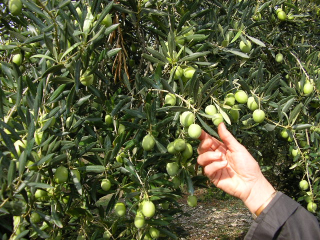 Cueillette d'olives vertes de variété Ascolana - septembre 2005- Hérault (France) - Jean-Michel Duriez Utilisateur:Jeanmi